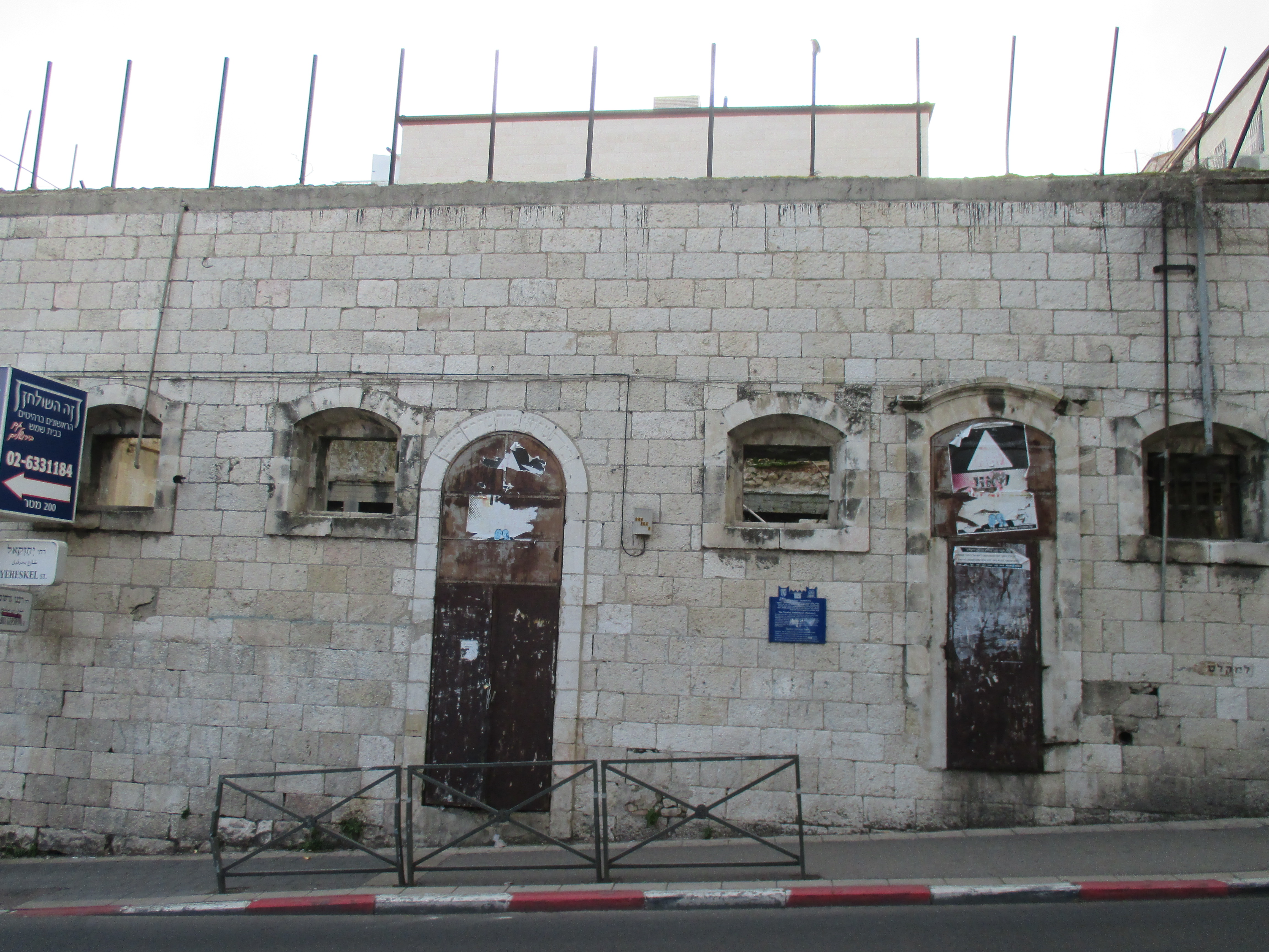 חורבת החמאם הטורקי ברחוב יחזקאל בירושלים